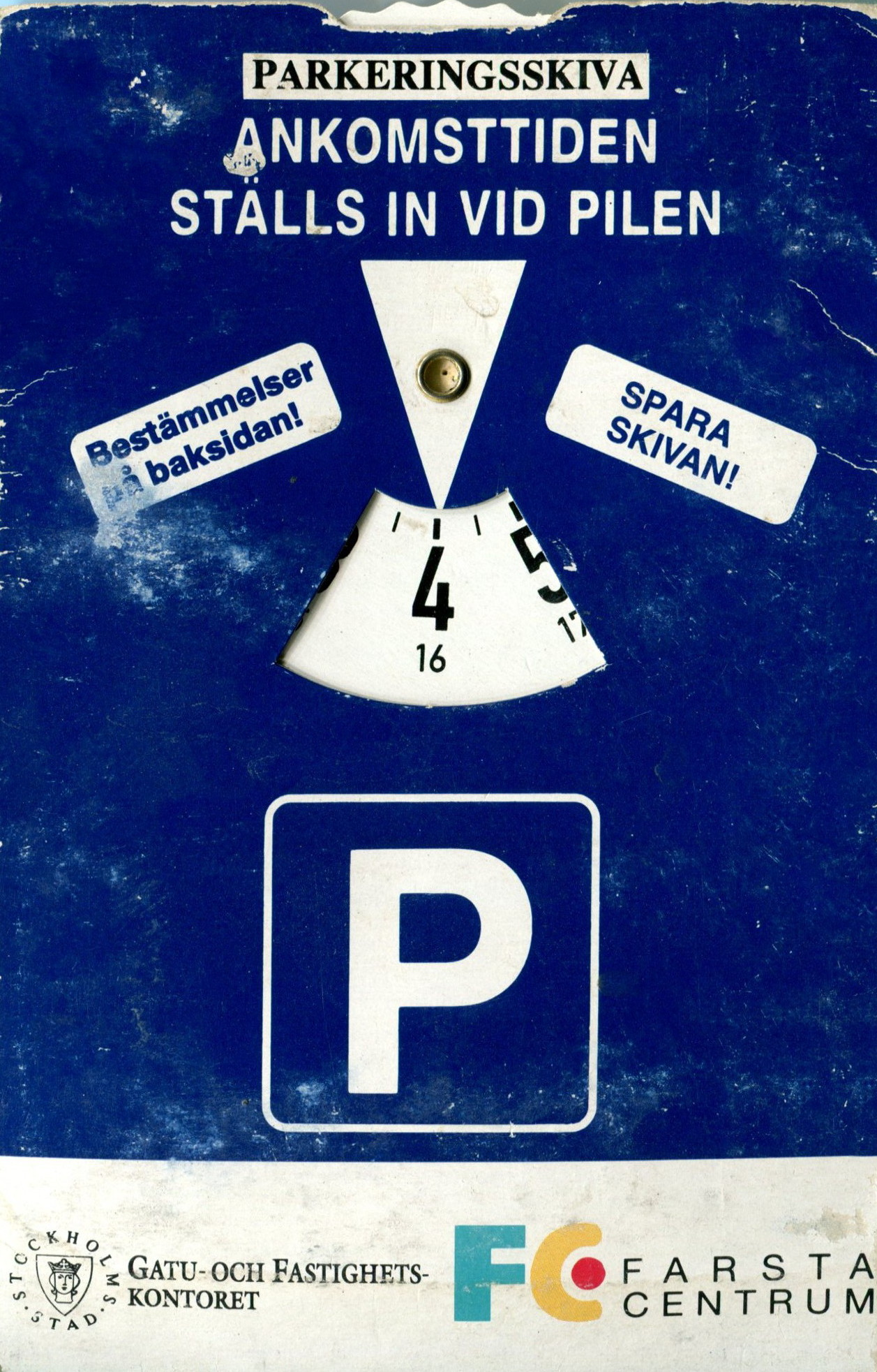 P-skiva från Farsta centrum. Farsta Centrum var den första plats i Stockholm där man kunde använda parkeringsskivan, premiären för det var 1 december 1993.